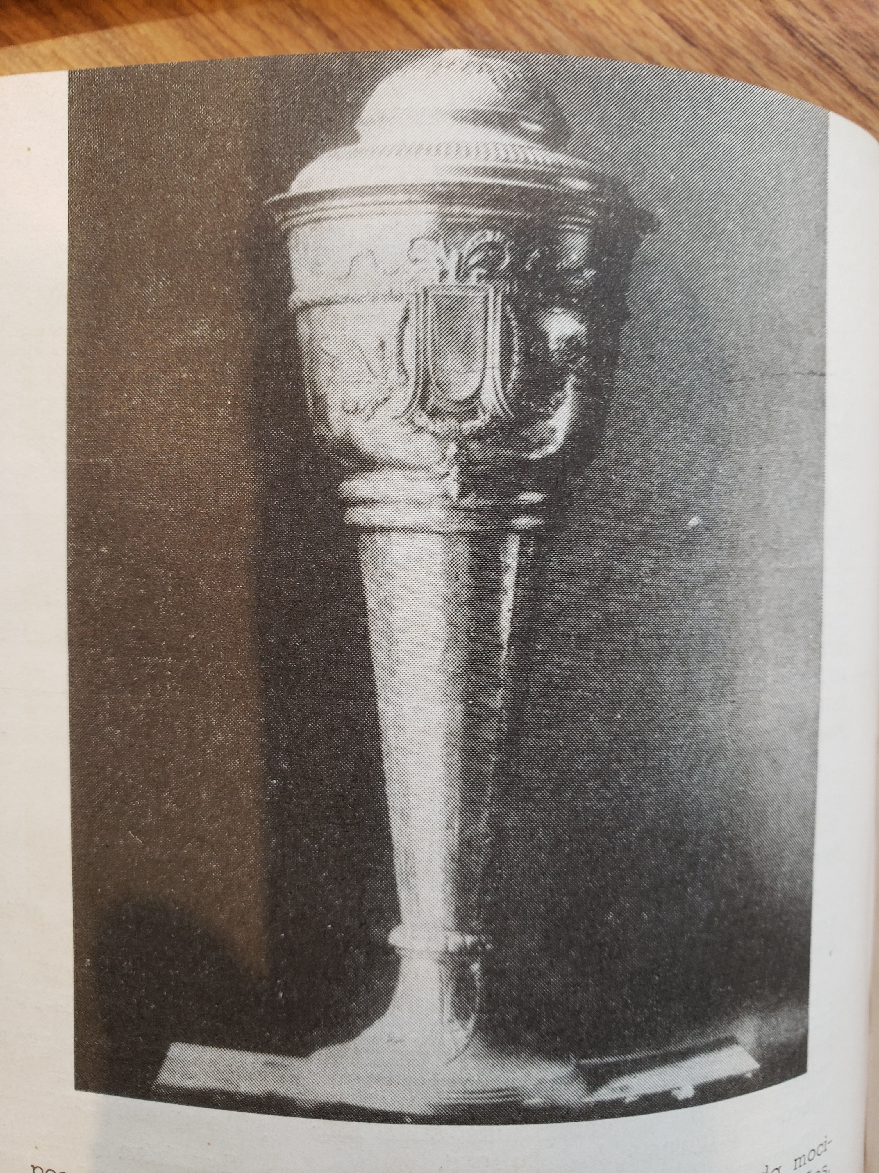 Taça Ioduran, primeira competição interestadual oficial do Brasil (1917-18-19), reproduzida a partir da Revista do Fluminense (oficial).